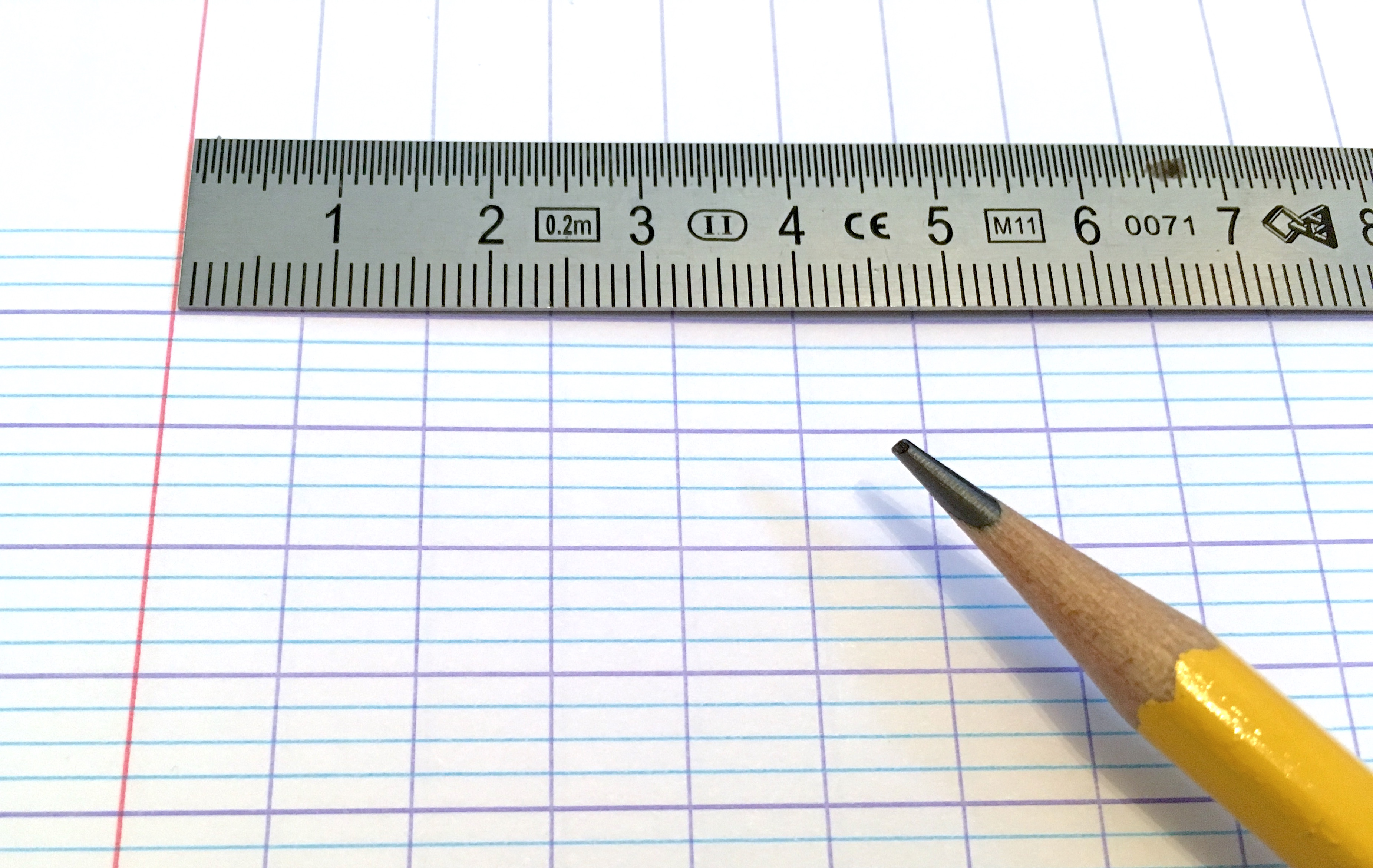 Mit Lineal und Bleistift als Größenreferenz.